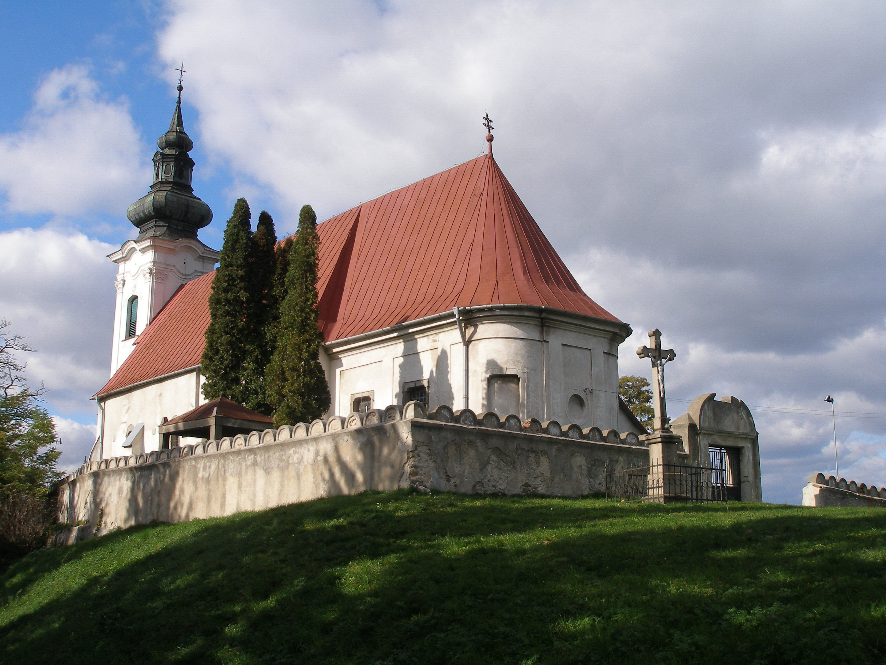 Kostol sv. Štefana Uhorského na Hrádku, v Solivare Šváboch. Mesto Prešov.Región Šariš.